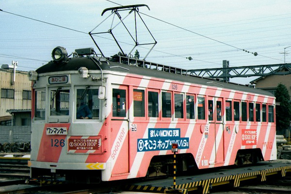 阪堺電軌モ121型126 我孫子道車庫にて撮影